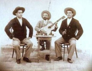 Escena flamenca (siglo XIX). A la izquierda Juan Manuel Reyes Osuna "El Canario"